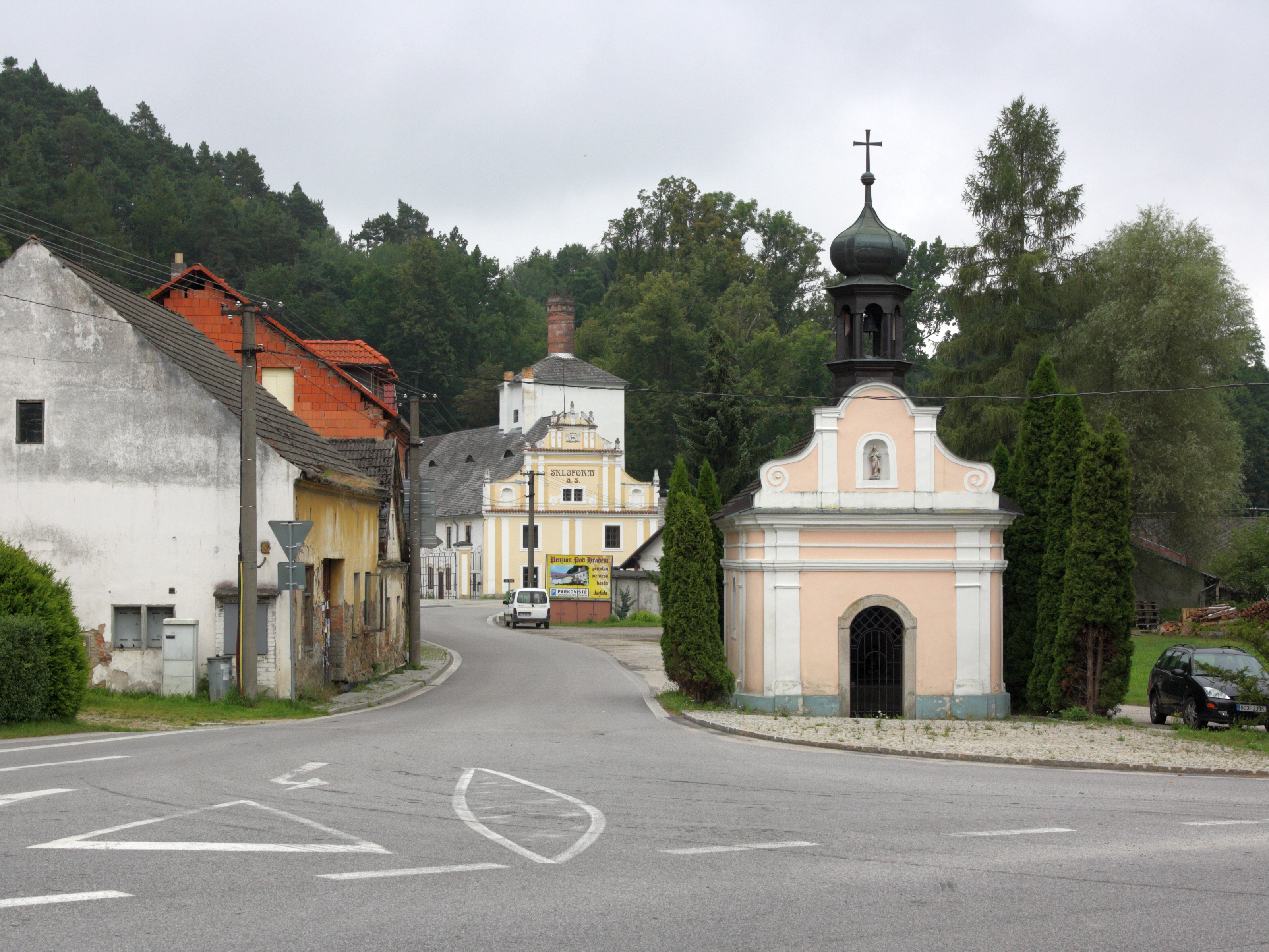 Údolí (Nové Hrady) - kaple a pivovar.